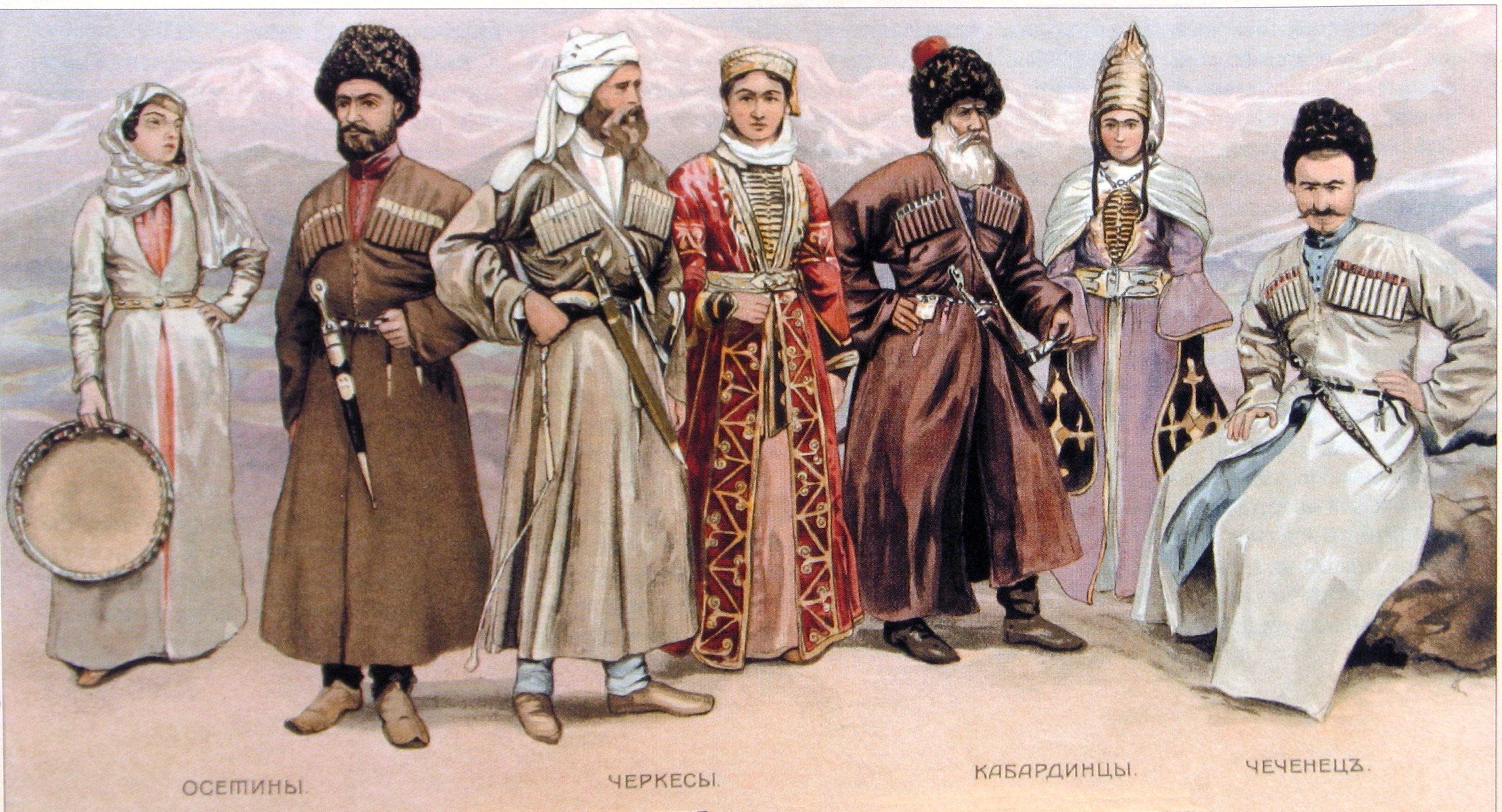 Народы Кавказа [Северного]. Русская хромолитография. Конец (последня треть) 19 века.